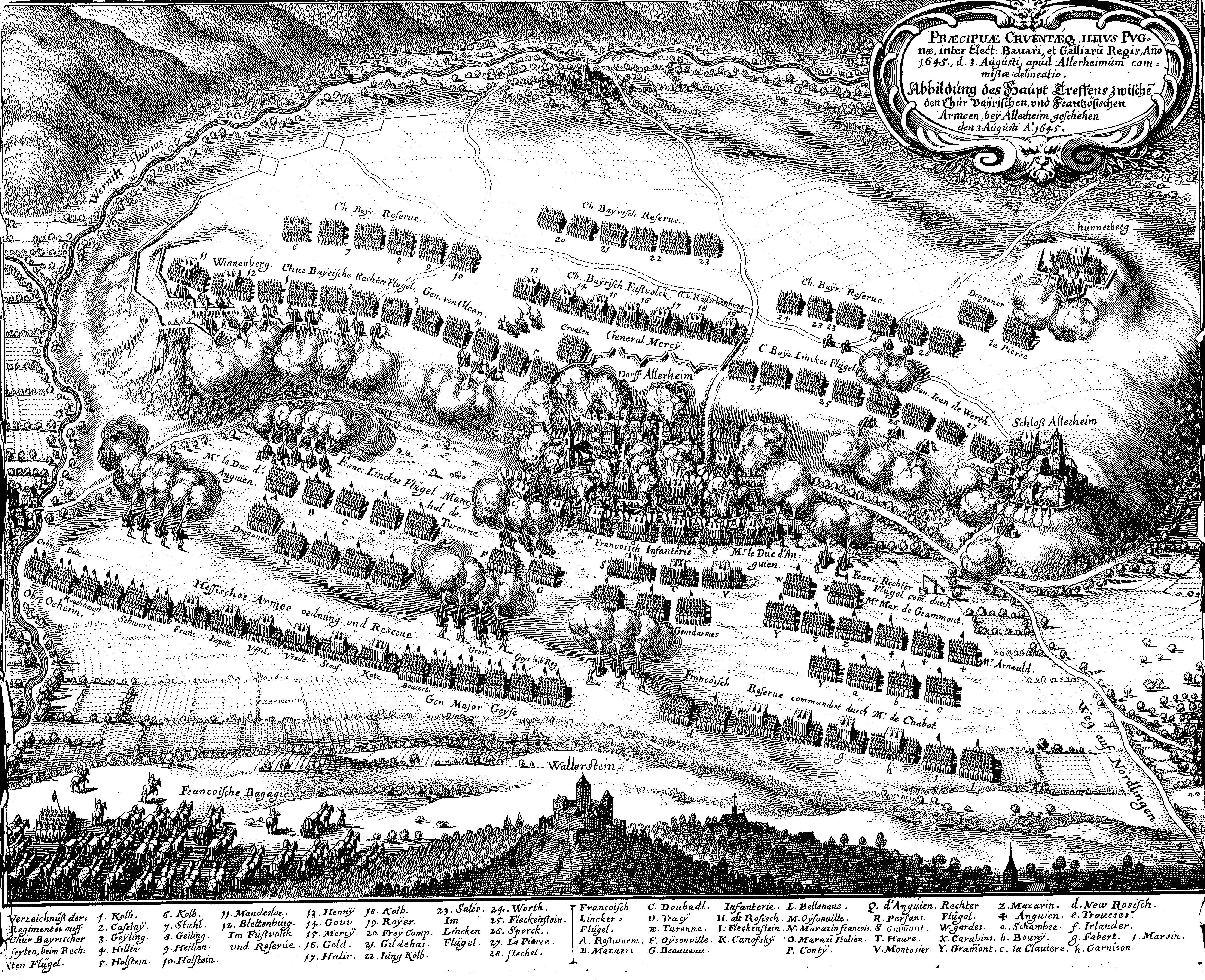 Abbildung des Haupt Treffens zwischen den Chur Bayrischen, und Frantzösischen Armeen, bey Allerheim geschehen den 3. Augusti A. 1645, Matthäus Merian, 1707